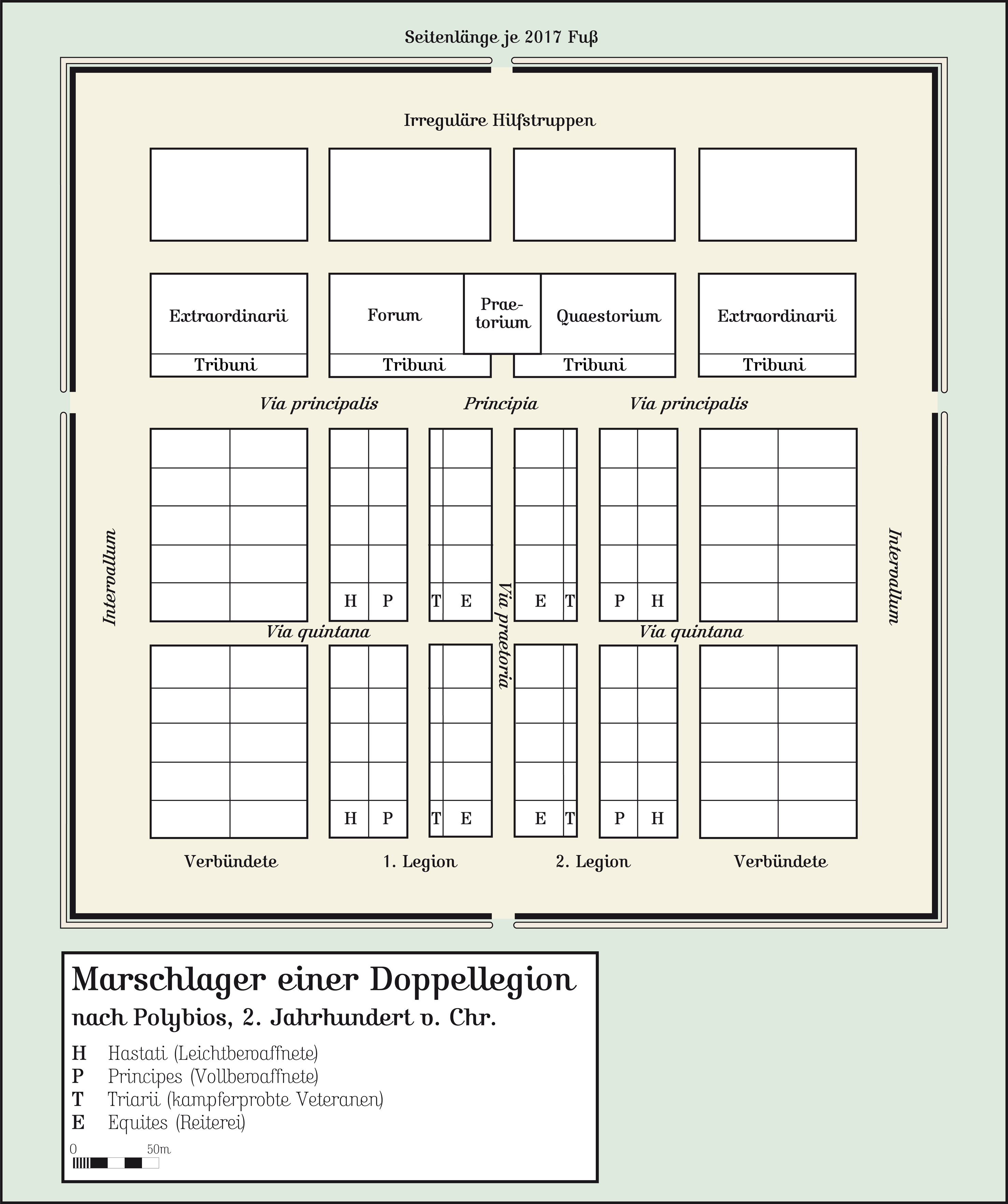 Römisches Marschlager nach Polybios, 2. Jh. v. Chr. Hergestellt am Macintosh unter Macromedia Freehand MX; abgespeichert für Wikipedia unter Adobe Photoshop CS 2. Quelle (Source): Anne Johnson (dt. Bearbeitung von Dietwulf Baatz): Römische Kastelle, Verlag Philipp von Zabern, Mainz 1987, ISBN 3-8053-0868-X.